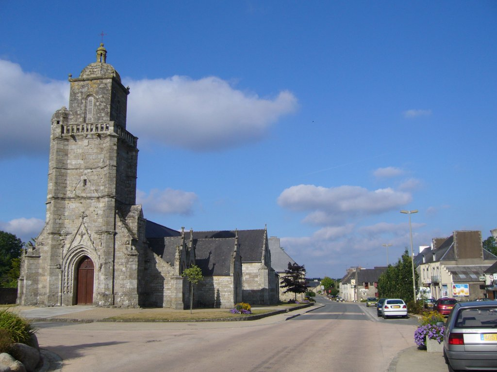 Auteur: Utilisateur:Suaudeau